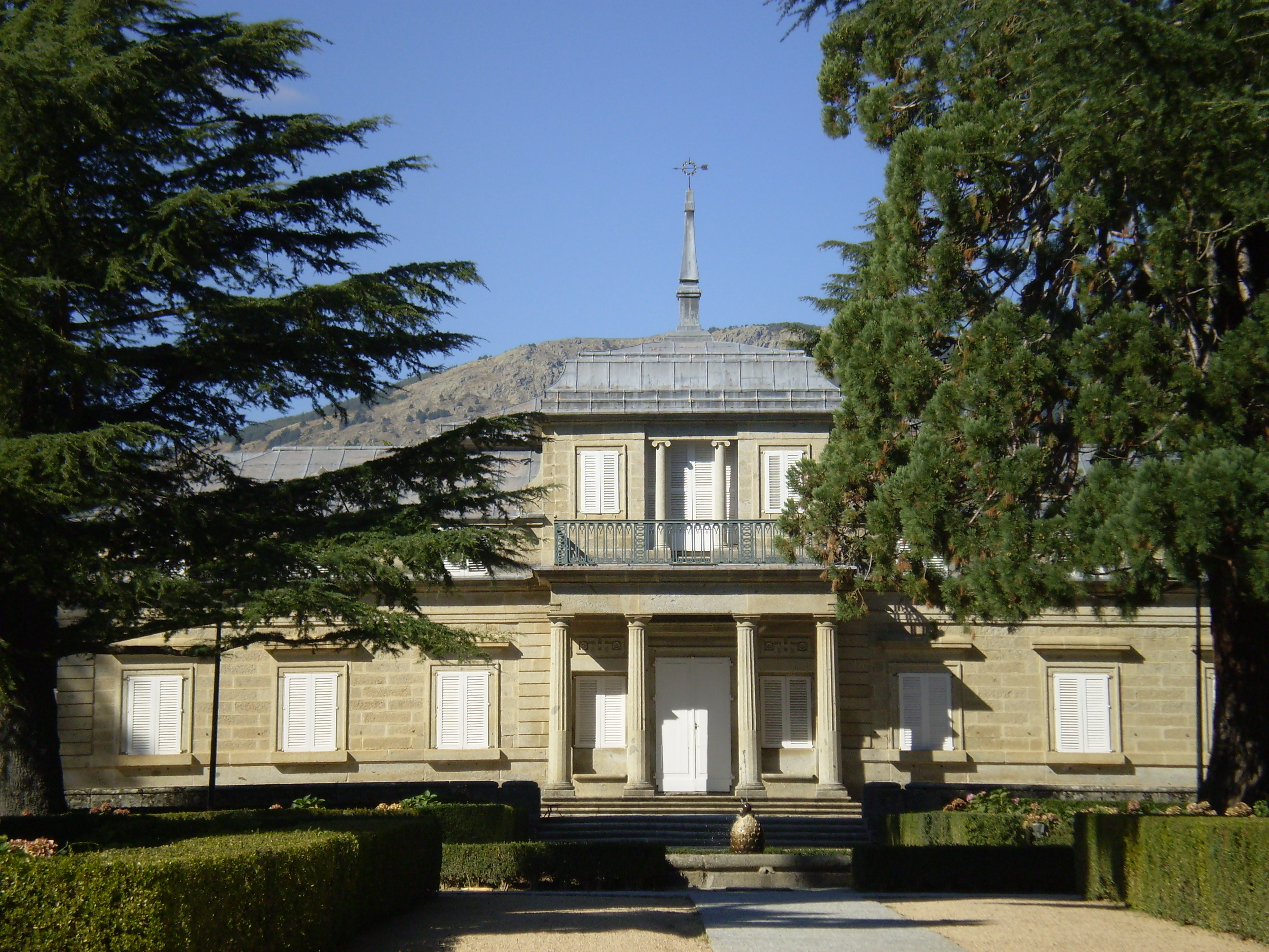 Casita del Príncipe. El Escorial, Community of Madrid, Spain